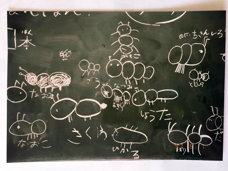 仮説実験授業の授業書〈足はなんぼん〉の問題1の予想を描いた黒板。アリの絵を小学校1年生が予想したもの。1997年の授業。 Pictures of ants drawn by students of elementary school in Japan.These are works drawn at the Hypothesis-Experiment Class(HEC).They answered question 1 of HEC Classbook"How many Legs?".